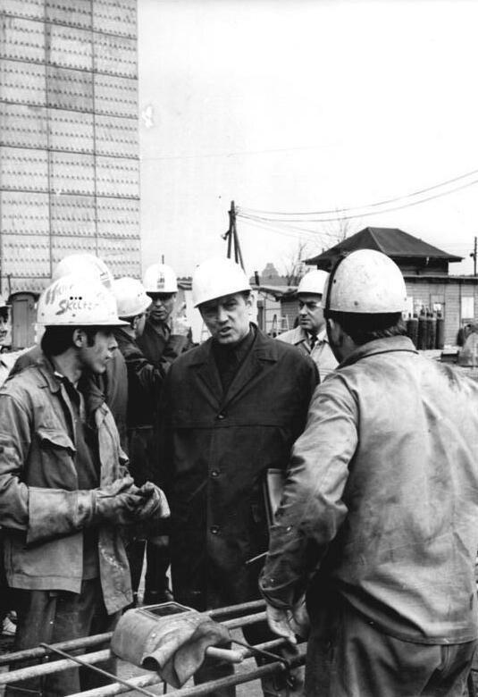 ADN-ZB Koch 19.11.71-ill-Leipzig: Abi kontrolliert Wintervorbereitungen-im Mittelpunkt der Arbeit der Arbeiter- und Bauerninspektion steht gegenwärtig die Kontrolle über die gründliche Vorbereitung auf die Winterperiode. Während eines Informationsrundganges auf der Baustelle Lößnig des Wohnungs-und Gesellschaftsbaukombinates Leipzig(WGK) am 18.10.71 kontrollierten Beauftragte der ABI gemeinsam mit Vertretern des Rates der Stadt Leipzig, unter ihnen Stadtrat Ritter (M) , den Stand der Wintervorbereitungen. Durch gut organisierte Maßnahmen wollen die Bauschaffenden des WGK die Bauarbeiten im neuentstehenden Johannes R. Becher- Viertel auch in der kalten Jahreszeit planmäßig weitetführen.